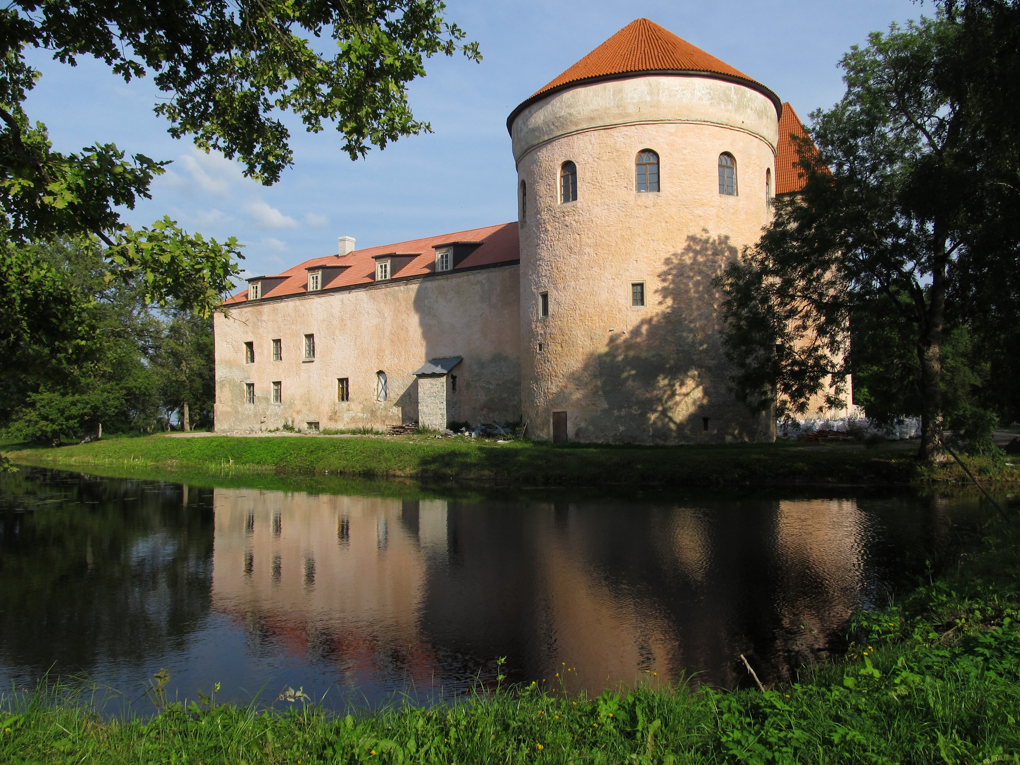 Koluvere linnus vallikraaviga